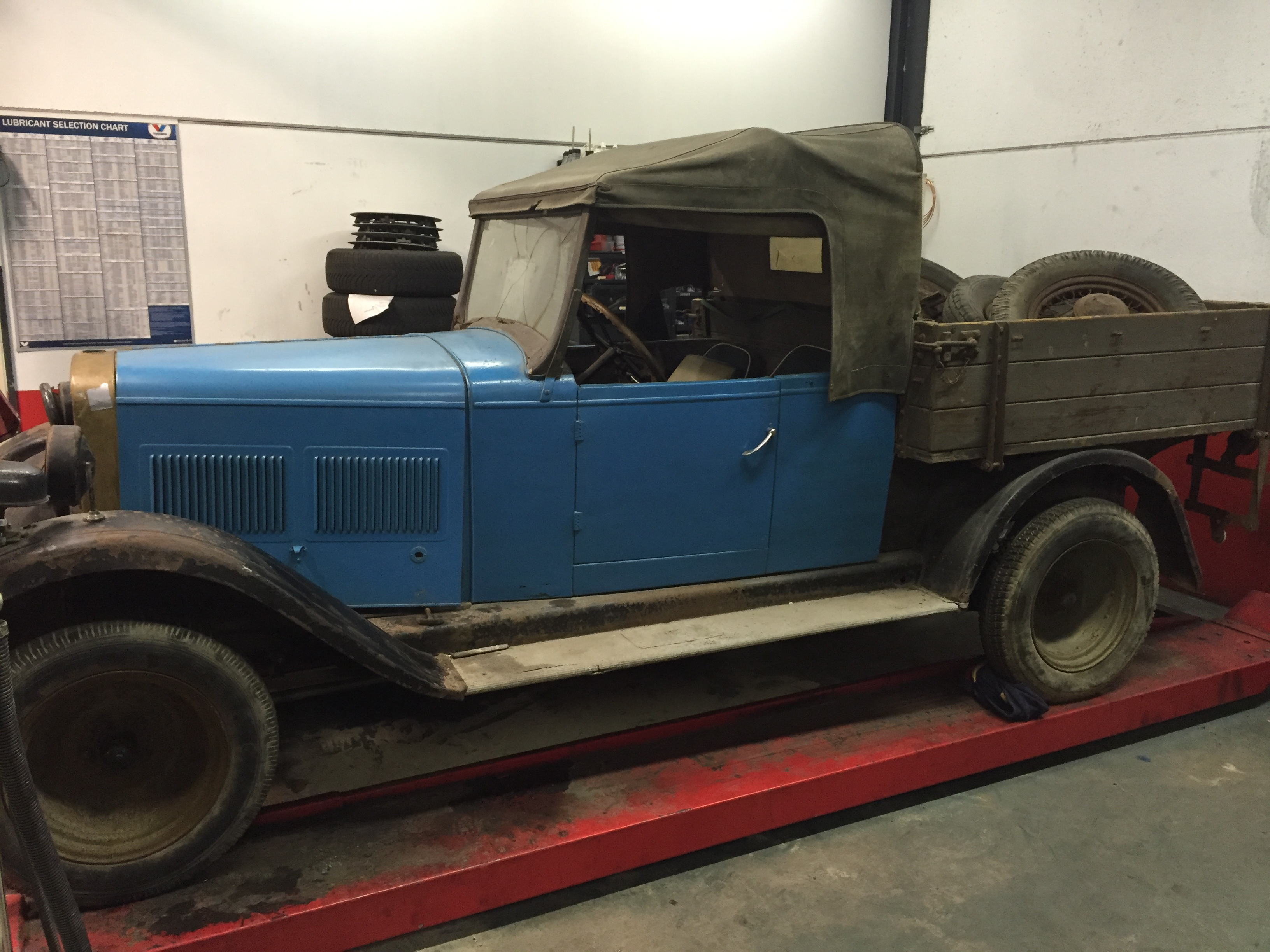 betreft een wanderer w10/2 uit 1927, uniek, locatie boxtel, eigen verzameling